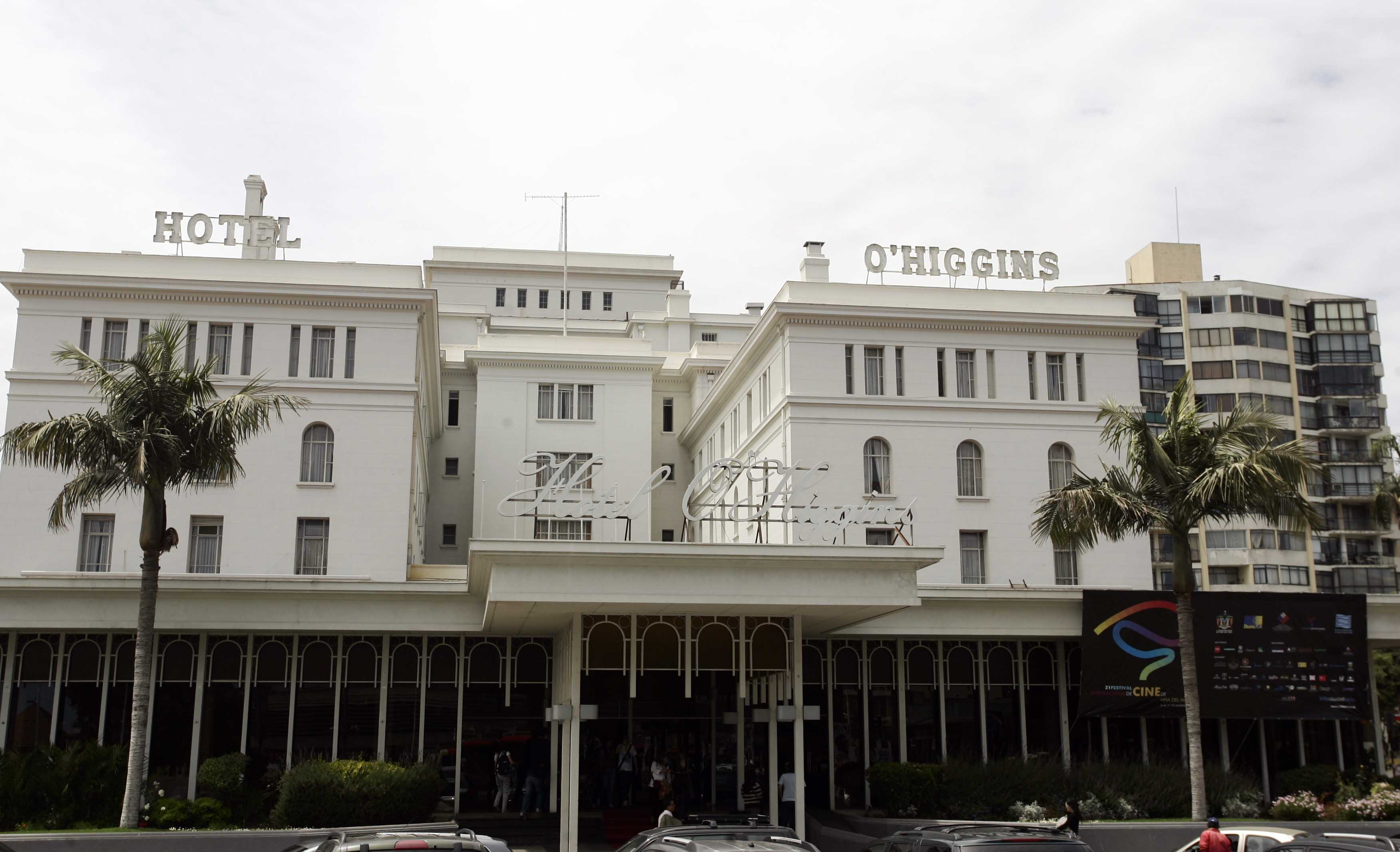 Sede oficial FIC Viña; año 2009